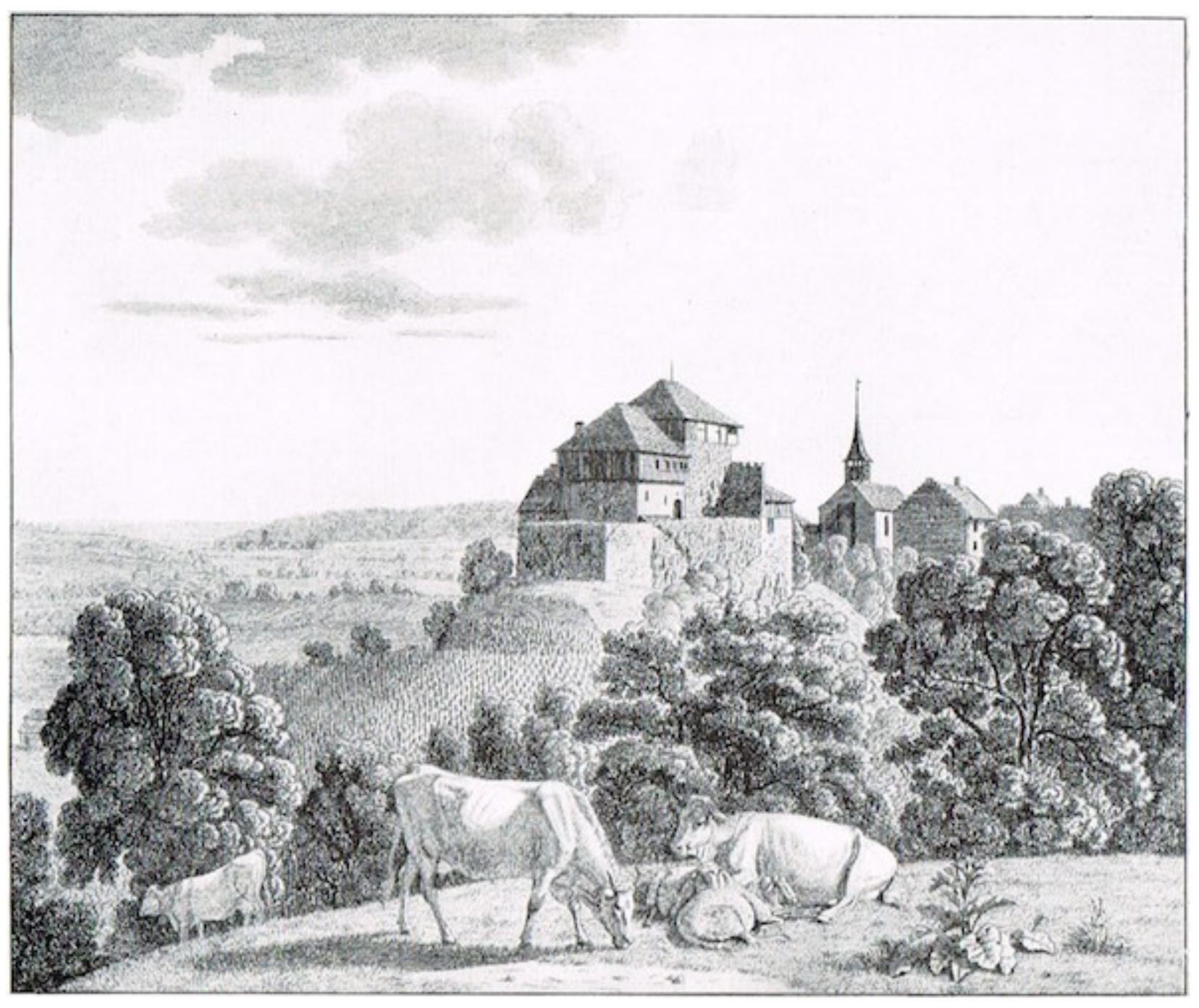 Radierung von Johann Jakob Biedermann (1763 - 1830)